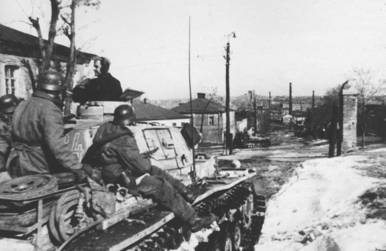 Information added by Wikimedia users.: Лысая гора, улица Революции 1905 года. На горизонте Домроектострой.